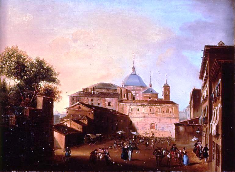 La obra representa la Plaza de la Paja de la ciudad de Madrid, capital de España, y conviene señalar que una réplica de esta obra fue donada en 1837 por el mismo autor a la Real Academia de Bellas Artes de San Carlos, aunque actualmente pertenece a la colección del Museo de Bellas Artes de Valencia, donde se conserva.